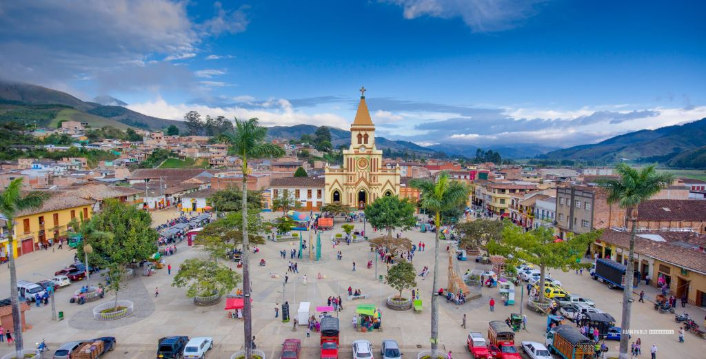 Parque Principal Rafael Uribe Uribe ubicado en el Municipio de Urrao